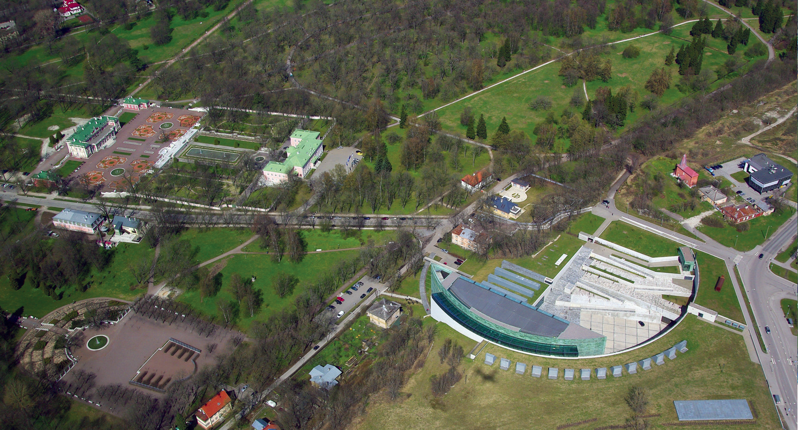 Õhuvaade Kumule ja Kadrioru pargile